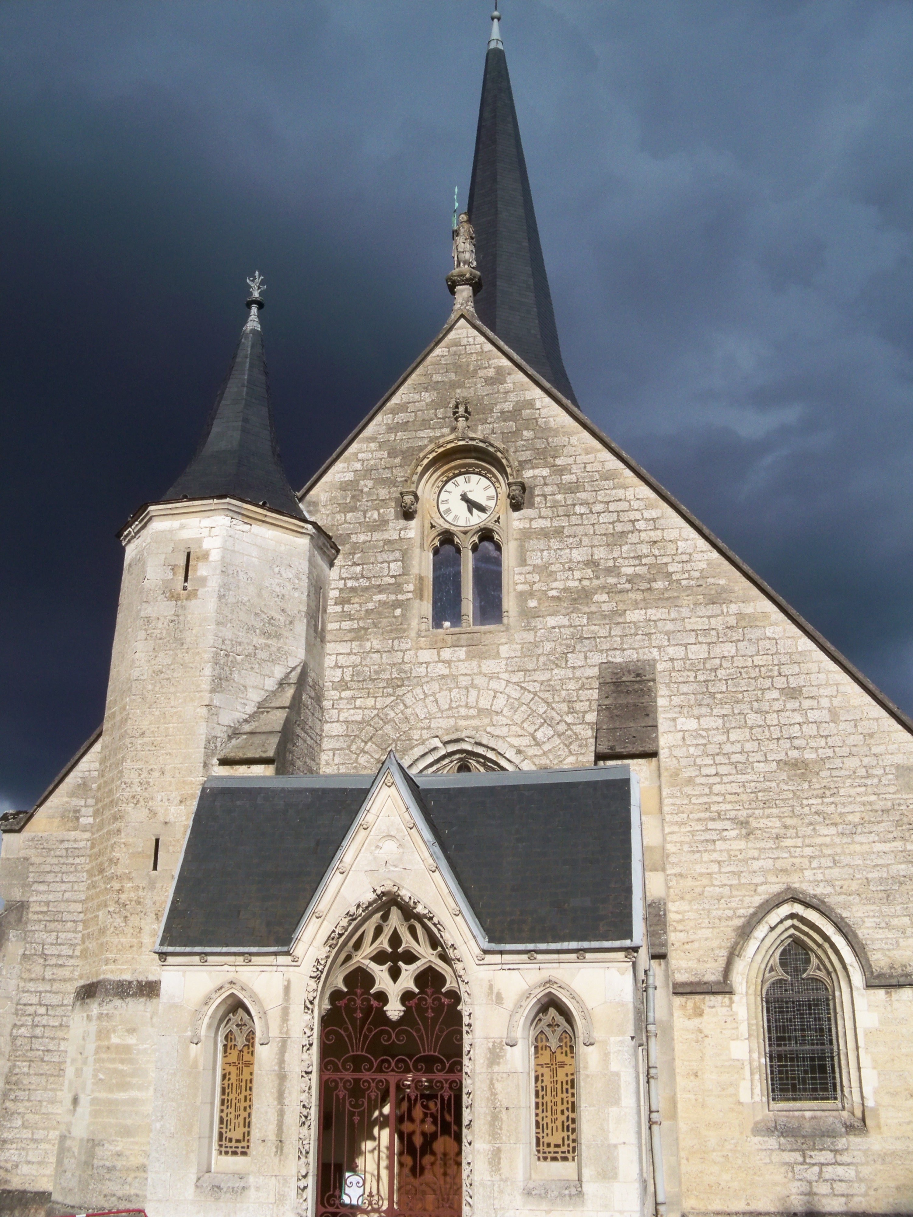 L'église Saint-Julien-de-Brioude à Saint-Julien-les-Villas, monument de culte inscrit au titre des monuments historiques en 1981. .